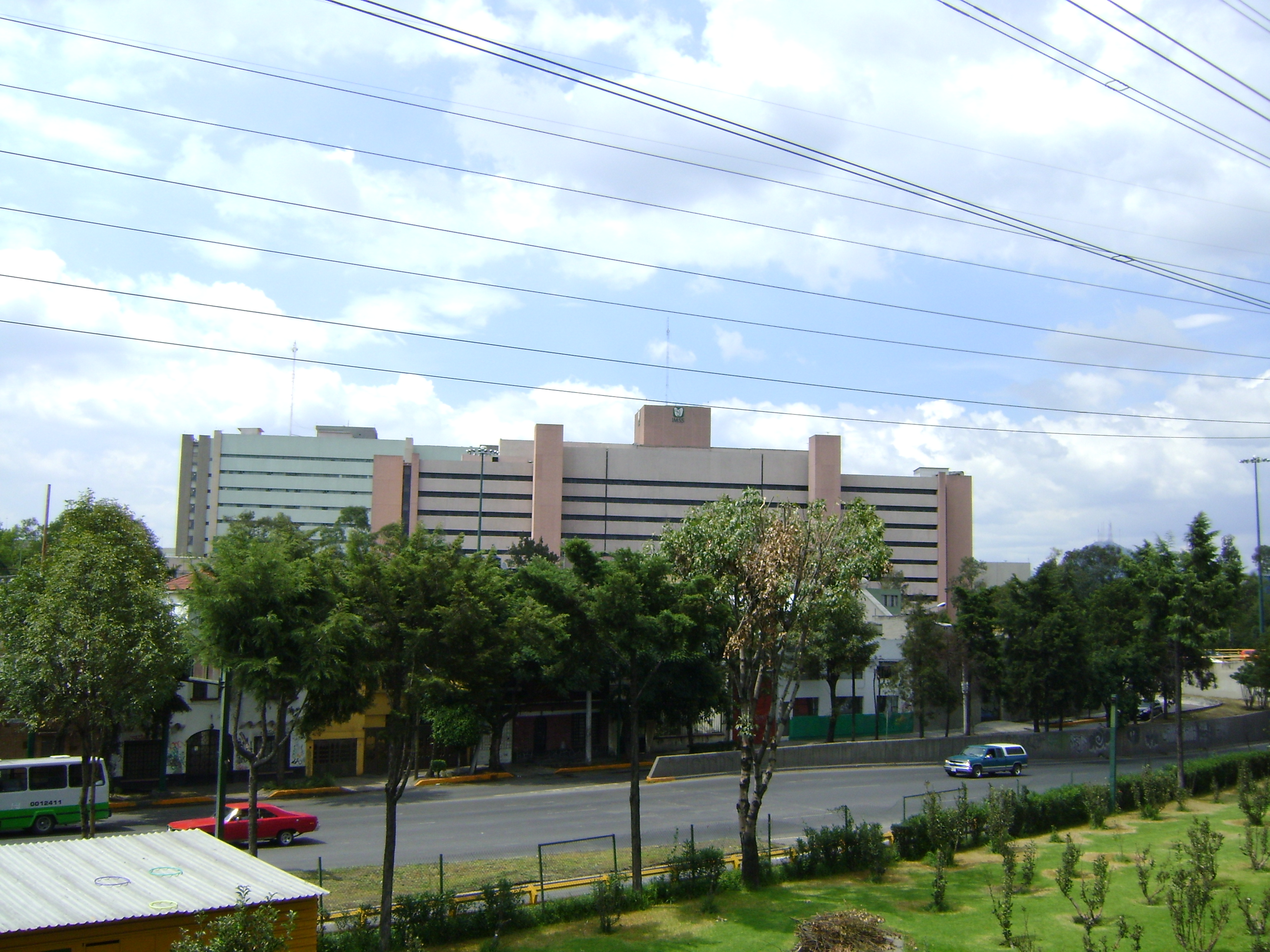 HOSPITAL LA RAZA DEL IMSS